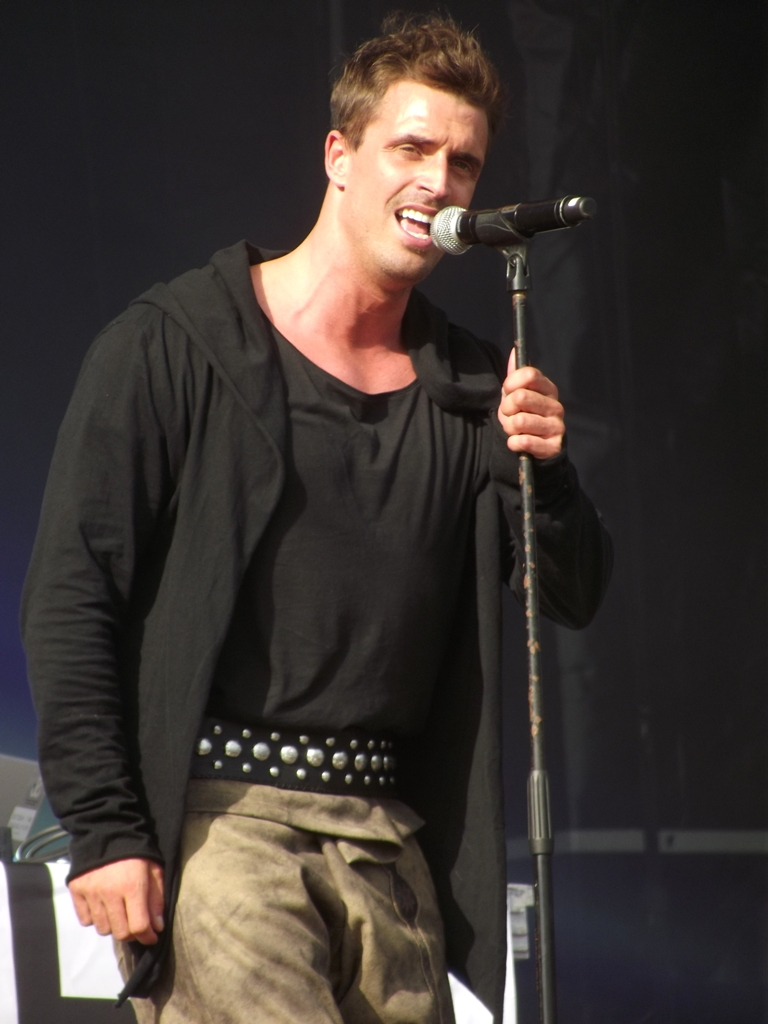 Zdjęcie zrobione podczas drugiego dnia Life Festivalu 2013 w Oświęcimiu.